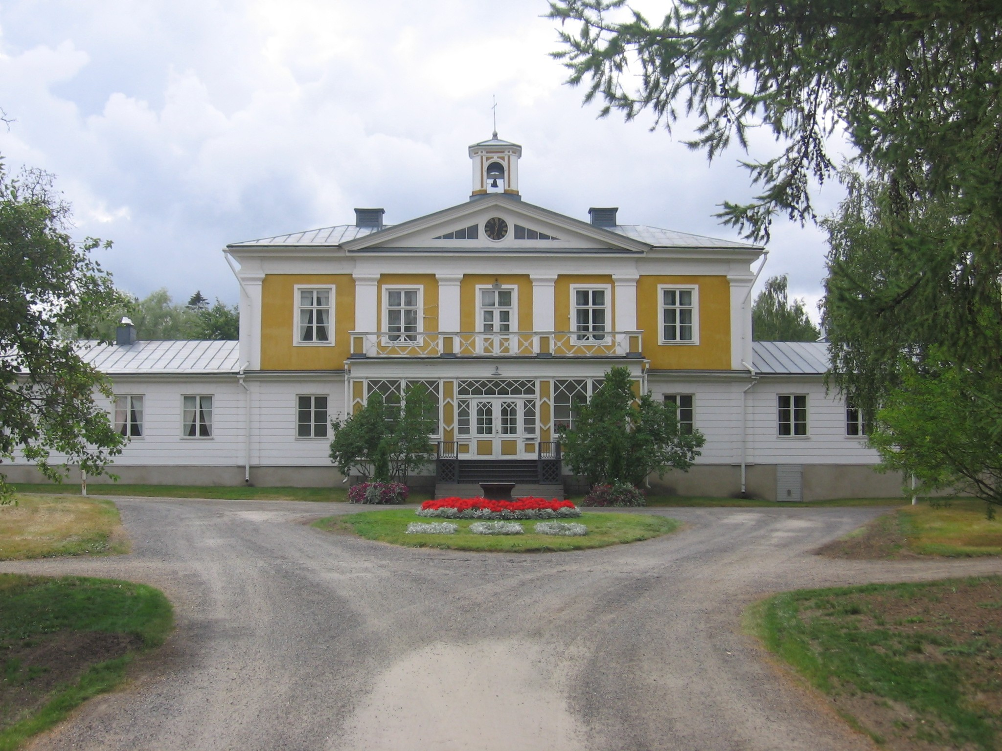 Törnävän kartano